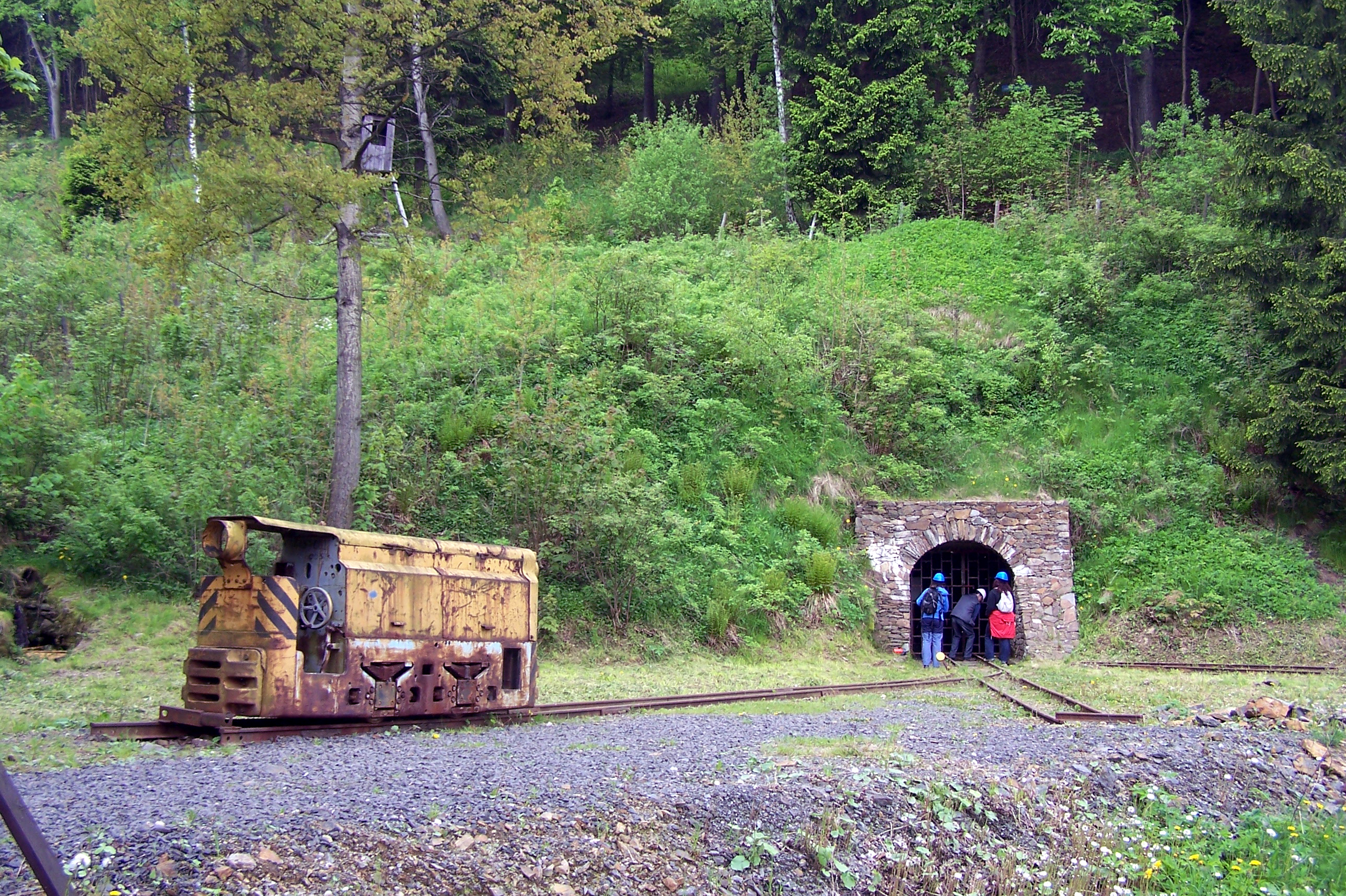 Hornický skanzen Štola č. 1.